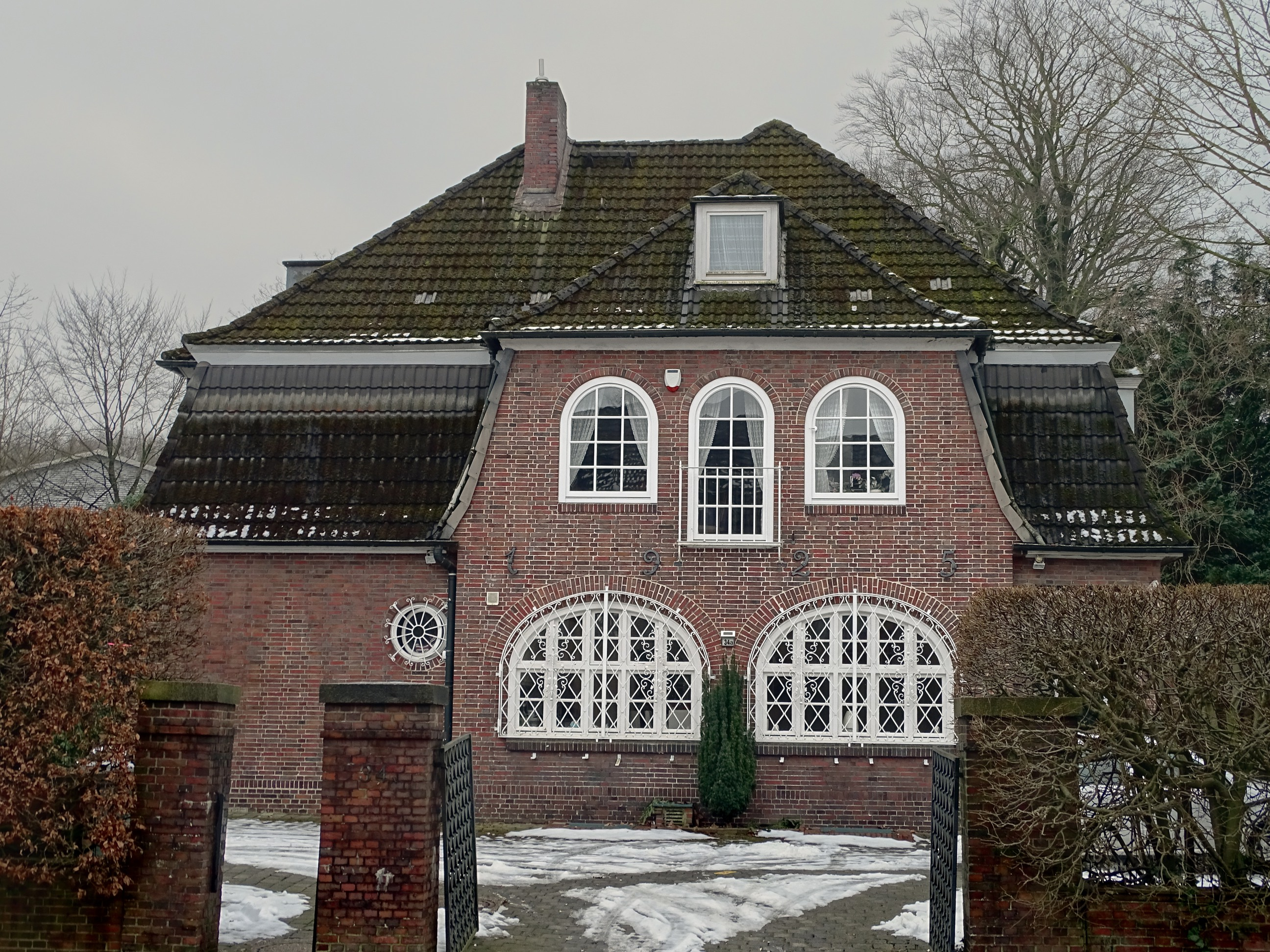 Pinneberg - Fahltskamp 34 a - Villa Wuppermann - Baujahr: 1925 - Architekt: Klaus Groth - Foto vom Januar 2018 Die ehemalige Villa des Pinneberger Industriellen Wupperman ist ein eingeschossiger Backsteinbau mit Mansardwalmdach. Sowohl das Haus als auch die Toranlage stehen aus geschichtlichen und städtebaulichen Gründen unter Denkmalschutz.This is a photograph of an architectural monument.